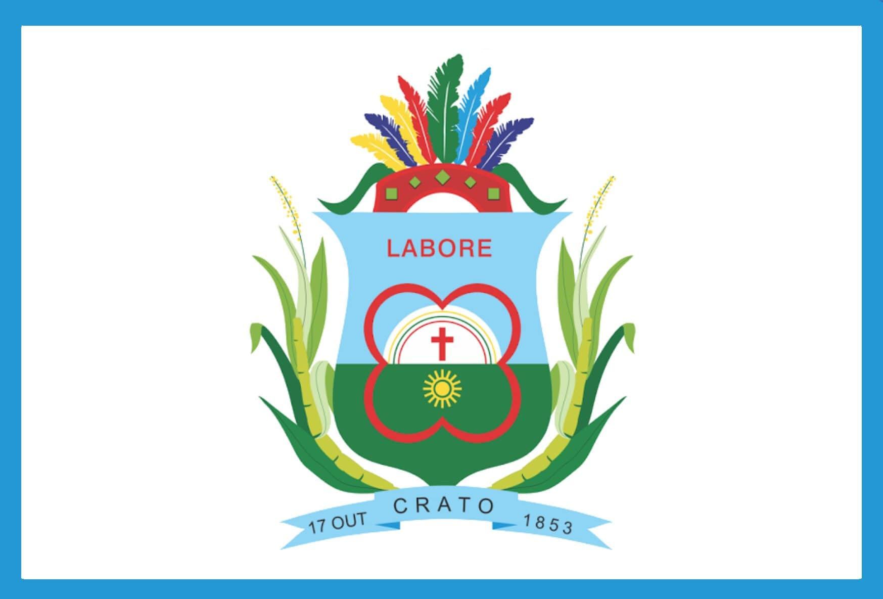 Bandeira do município de Crato, CE.